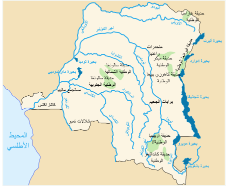 حدائق الكونغو الديمقراطية